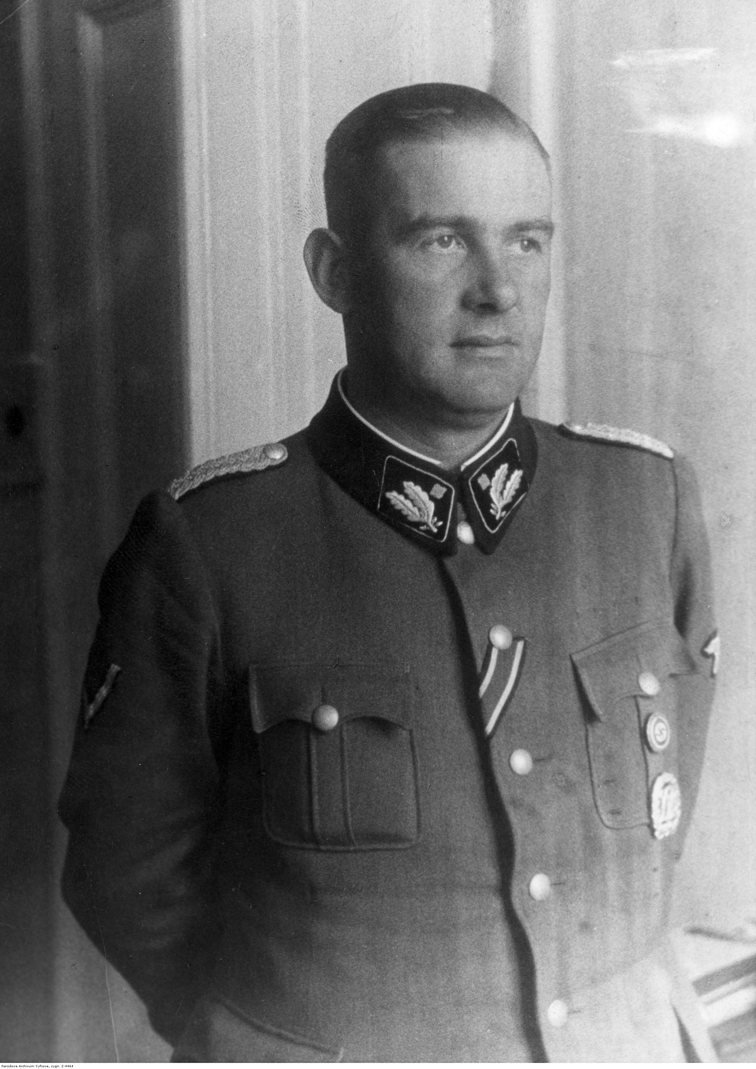 Odilo Globocnik (1904–1945), SS- und Polizeiführer Lublin